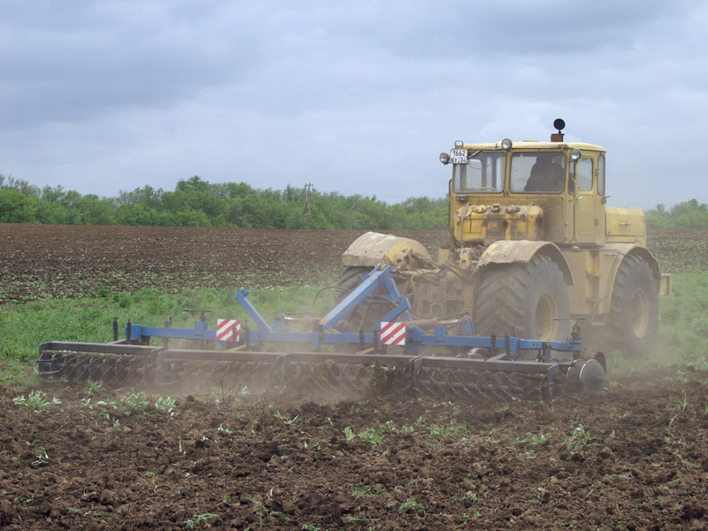 Культивирование поля. Культиватор с дисковыми сошниками. К-700 (Кировец). Волгоградская область.